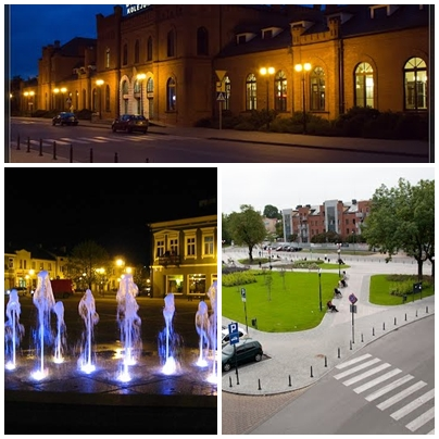 Widokówka miasta Skierniewice